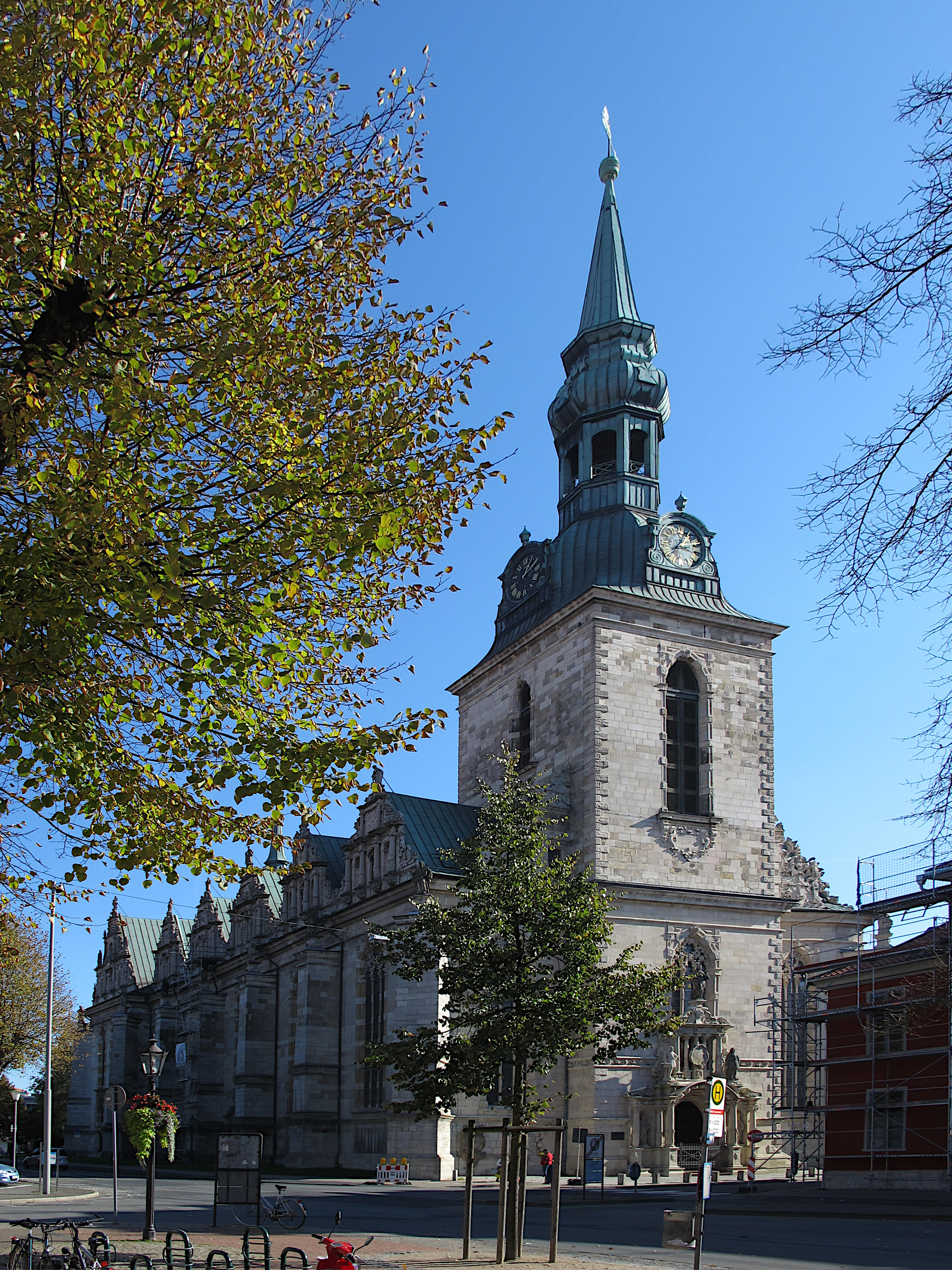 Wolfenbüttel: Kirche Beatae Mariae Virginis (Marienkirche): Nordwestseite (Außenansicht)